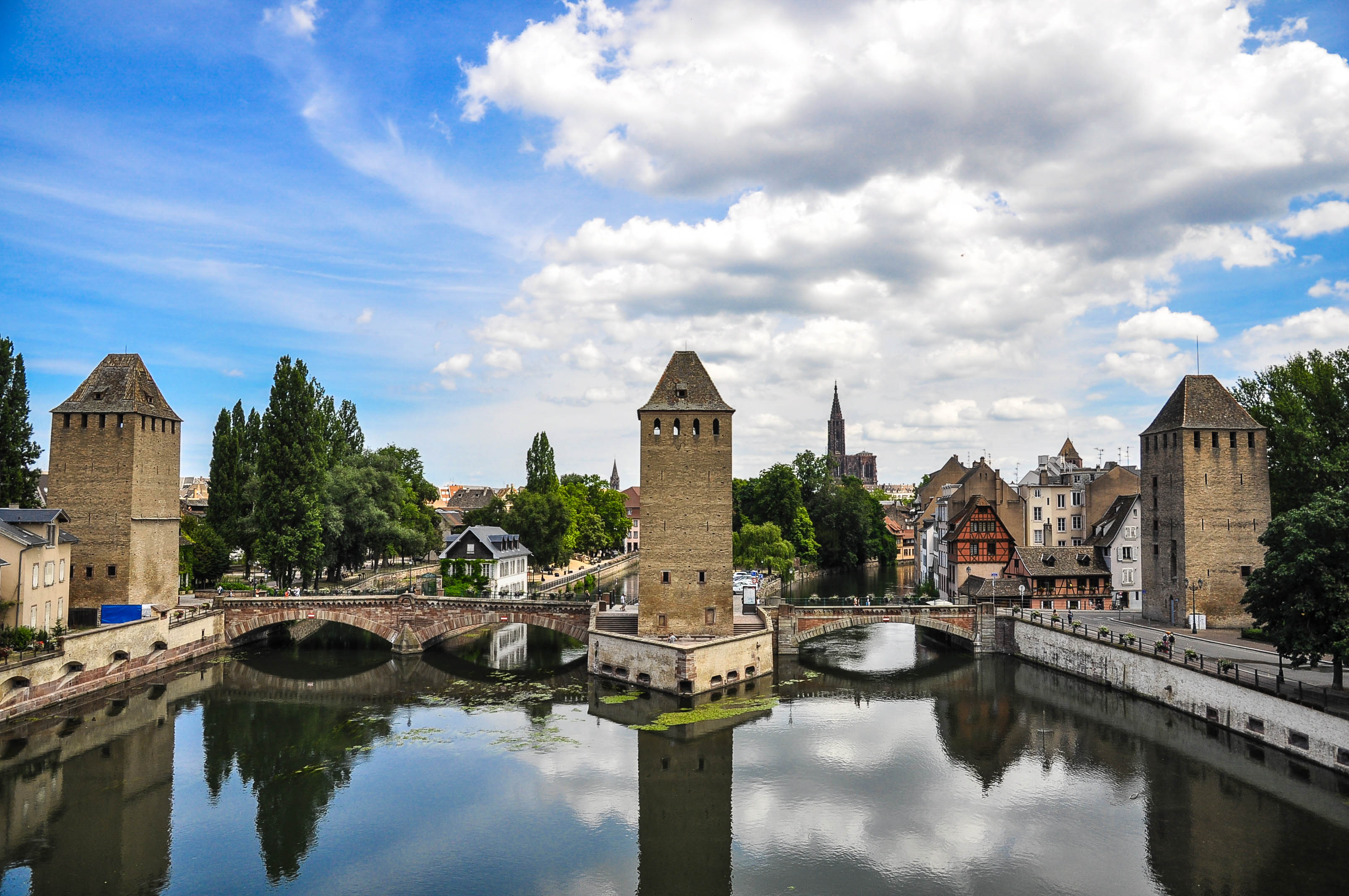 Les Ponts couverts de Strasbourg vus depuis la terrasse panoramique du barrage Vauban